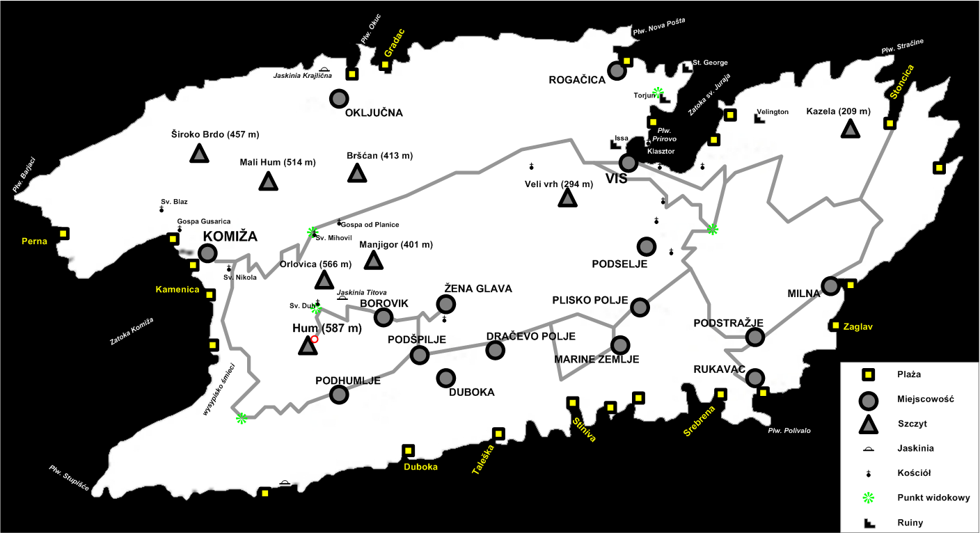 Przybliżona mapa wyspy Vis z miejscowościami, szczytami, plażami i ważniejszymi kościółkami.